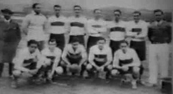 Formación de Gimnasia y Esgrima La Plata, posando en Europa, durante la gira que realizó en 1930.